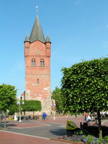 Alter Marktplatz und St. Petri-Kirche in Westerstede